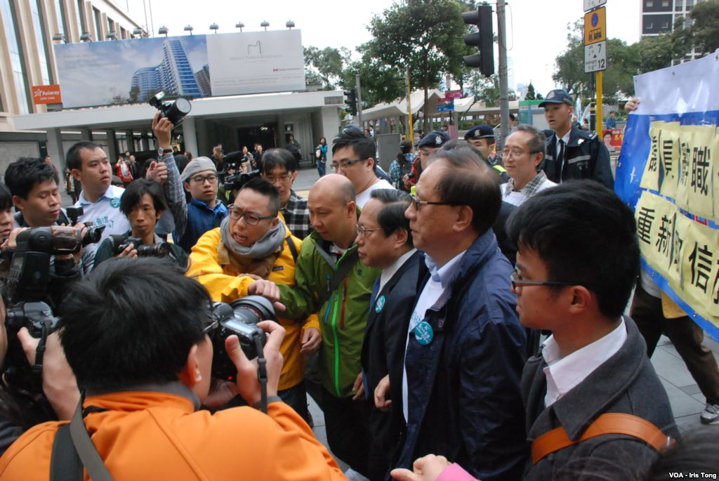 中文（香港）: 人民力量成員譚得志(穿黃色風衣者)不斷向民主黨立法會議員何俊仁叫罵。